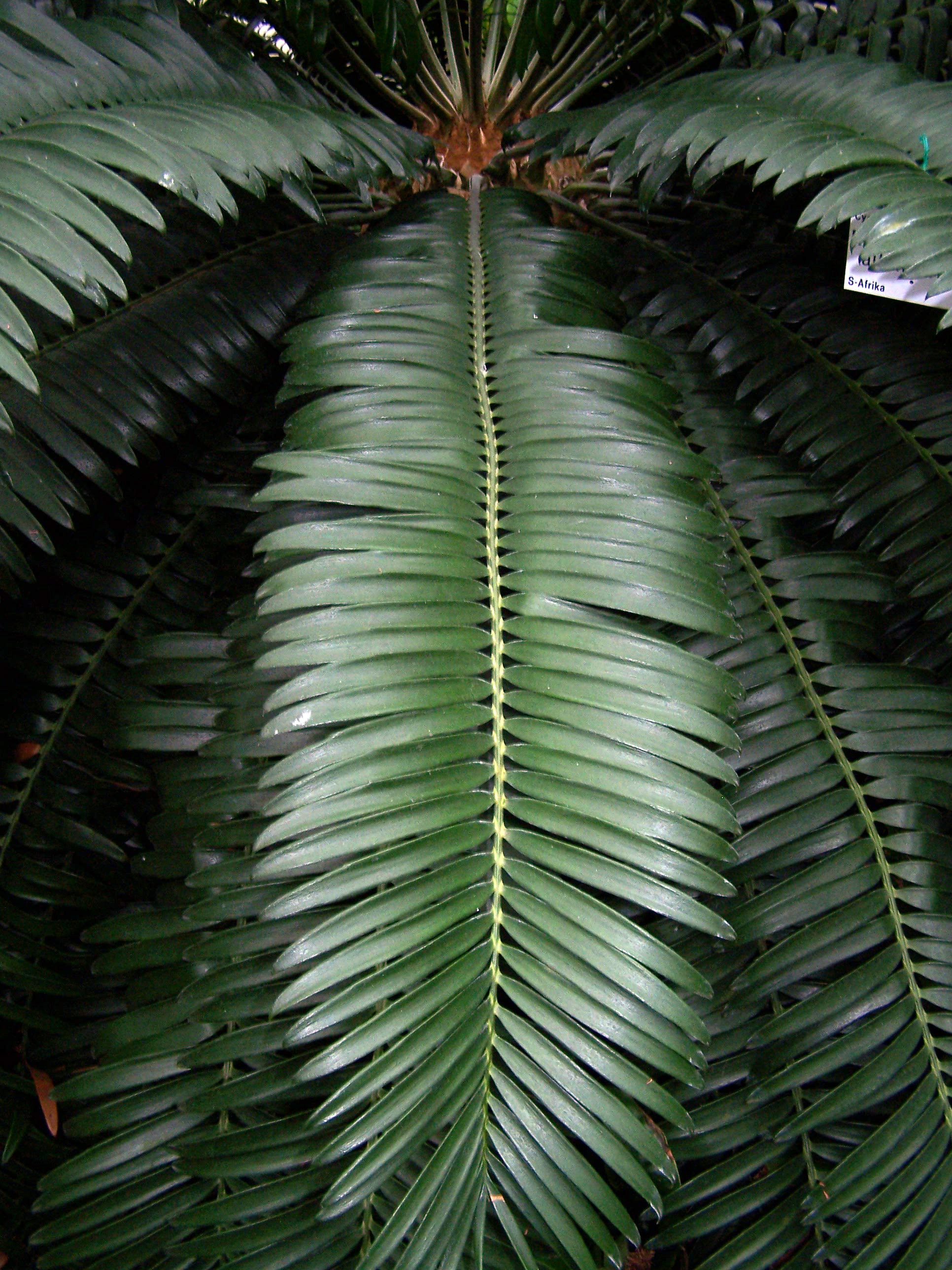 Encephalartos altensteinii 17 juin 2006 Vieux jardin botanique de Göttingen